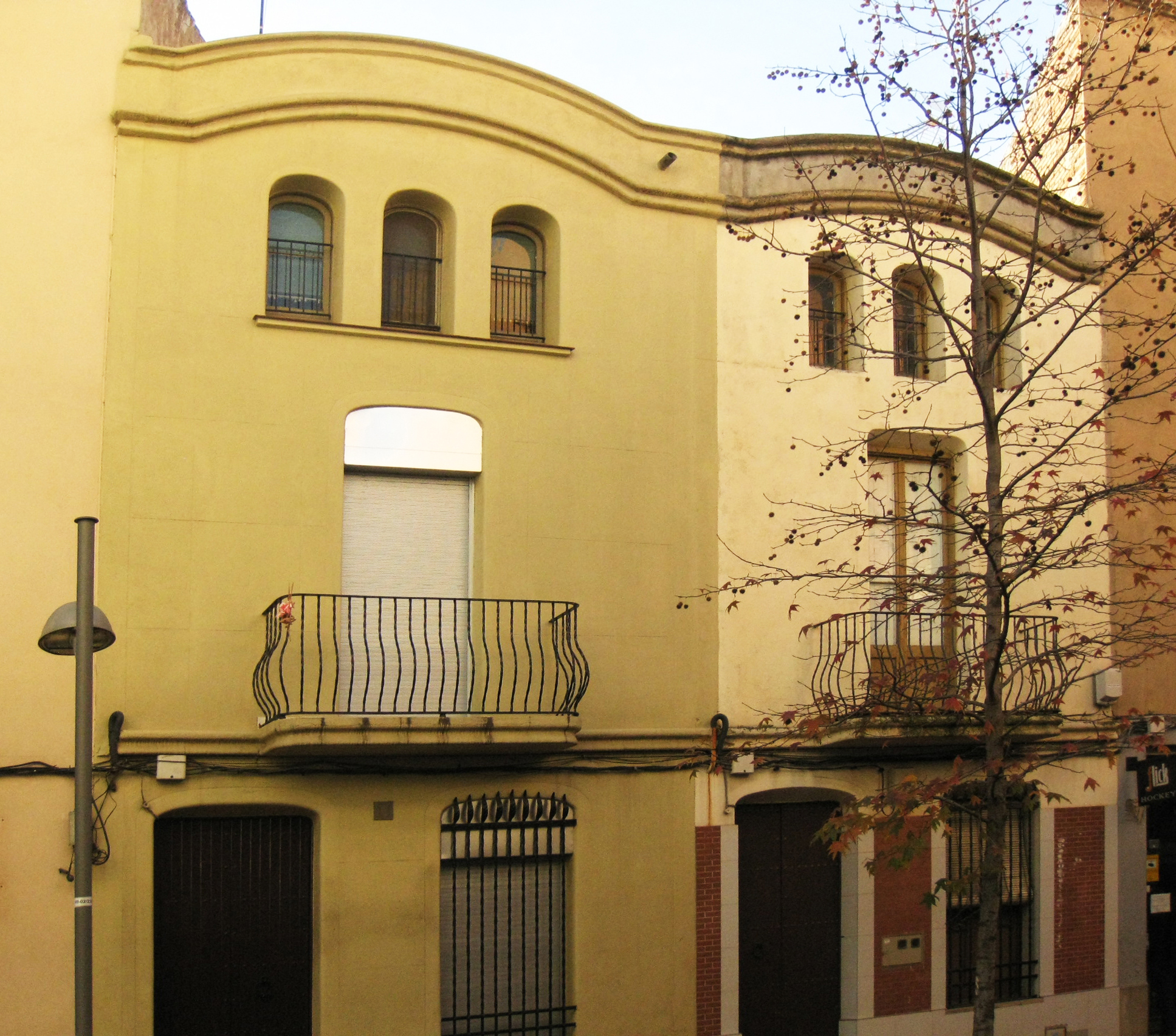 Casa Ramon Samaranch, obra de Lluís Muncunill de 1916, al carrer de Volta núm. 13 (Terrassa).